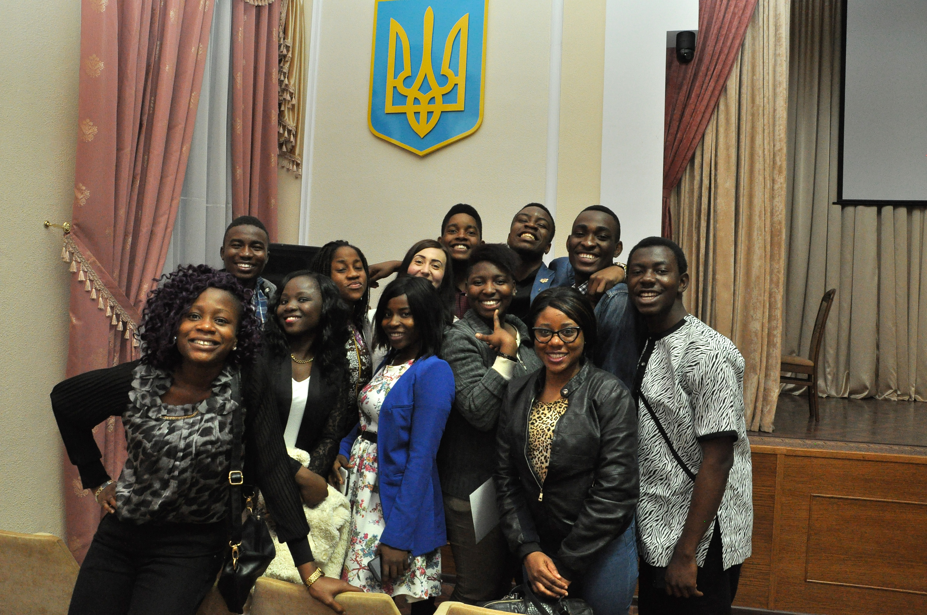 Літературно-музичне свято «Мова єднає нас», зорганізоване слухачами підготовчого відділення факультету іноземних студентів ТДМУ.